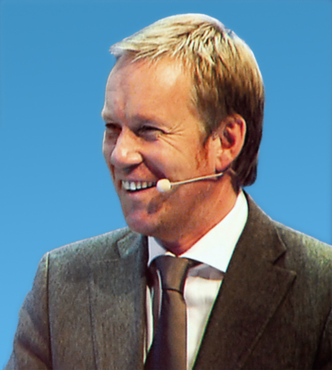 Johannes B. Kerner mit Mikrofon